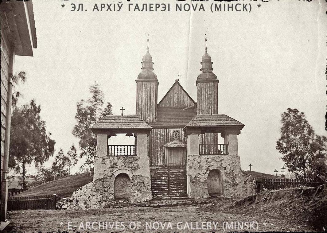 Беларуская (тарашкевіца): Залужжа (Załužža). Царква Сьвятога Юрыя